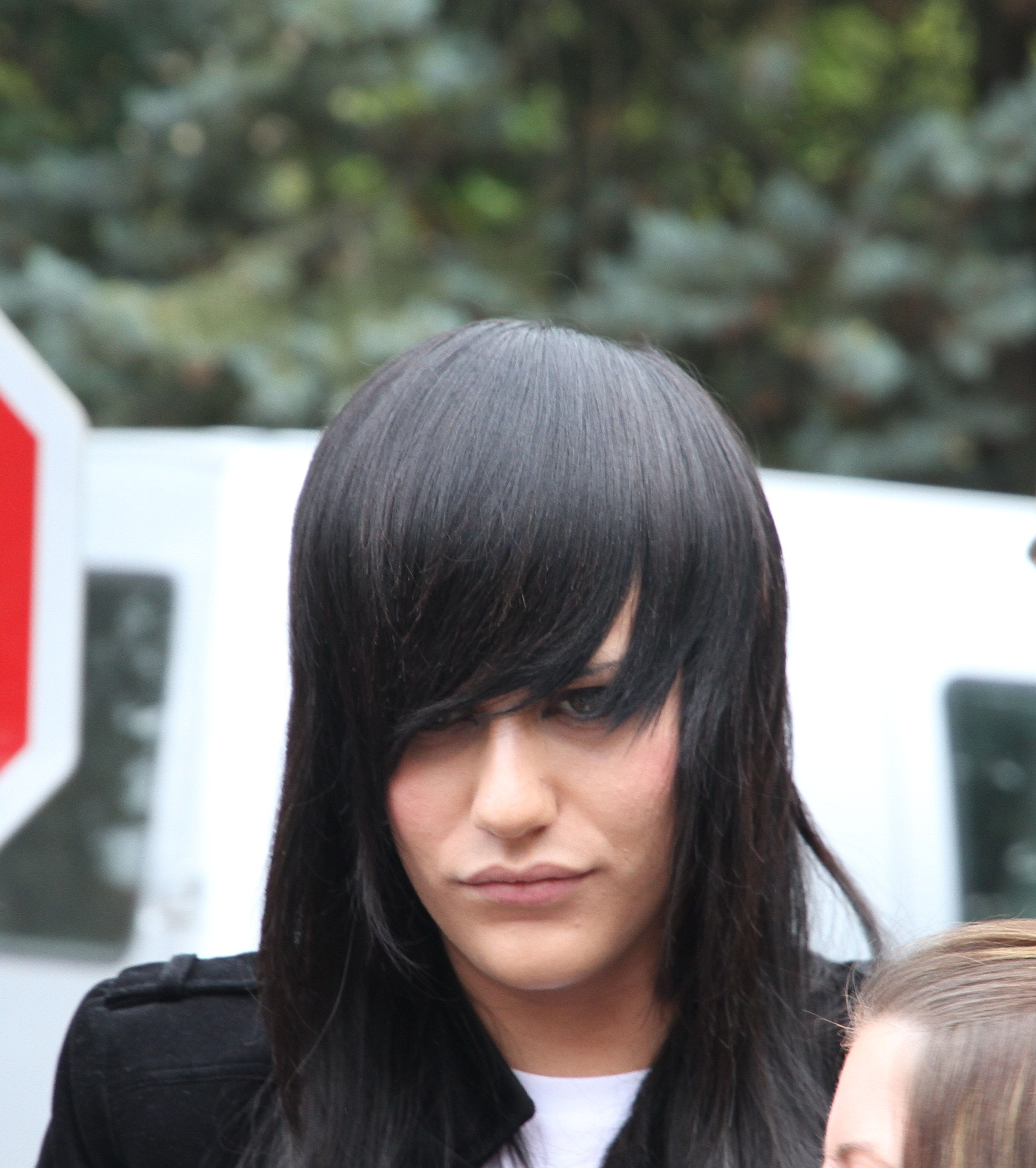 Thomas Vitiello à Villeneuve-sur-Yonne